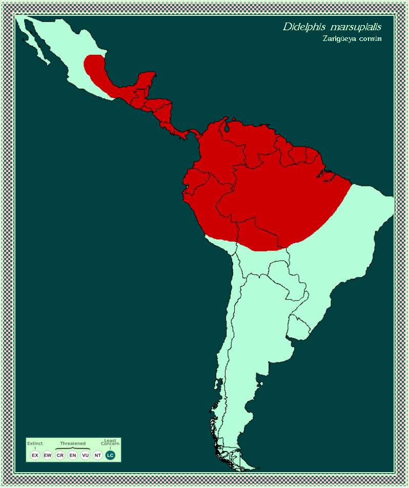 Mapa del área de distribución de Didelphis marsupialis